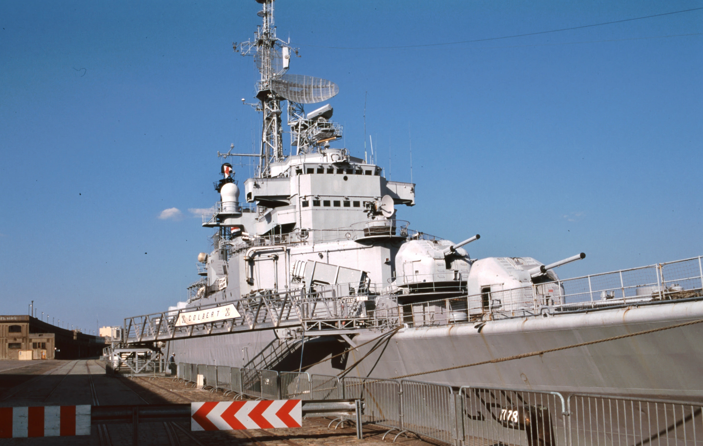 Cruiser Colbert Bordeaux